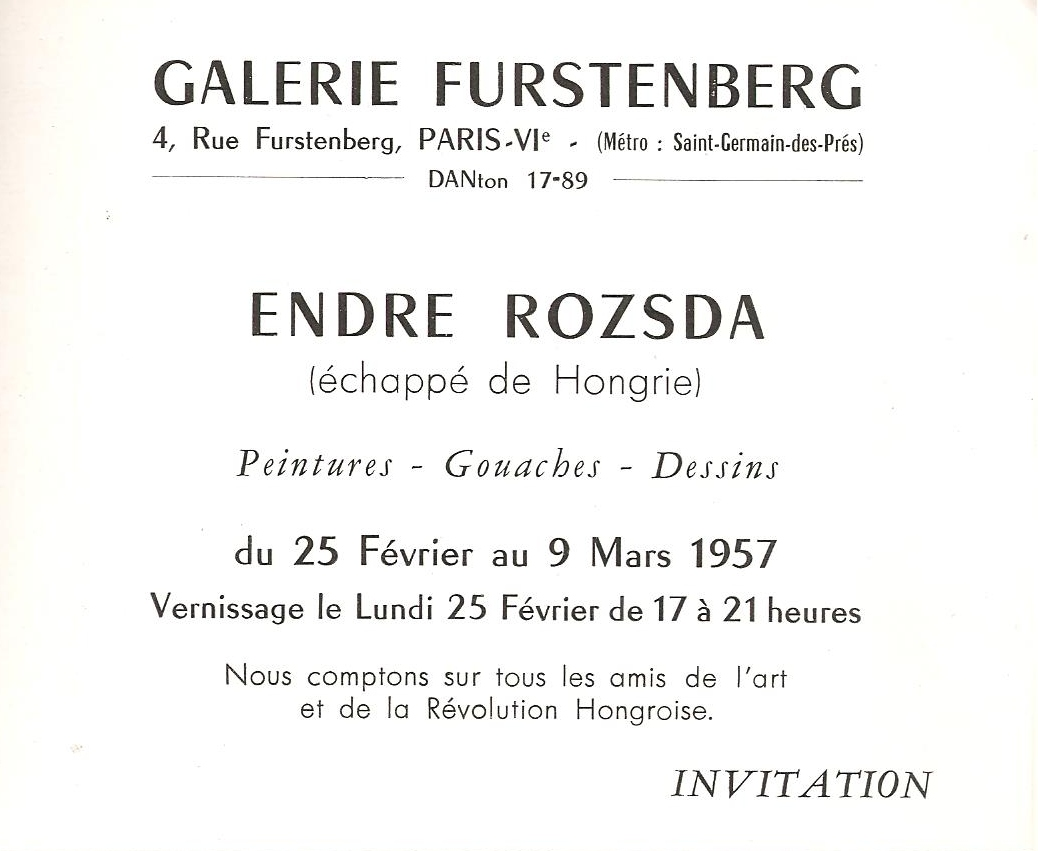 meghívó